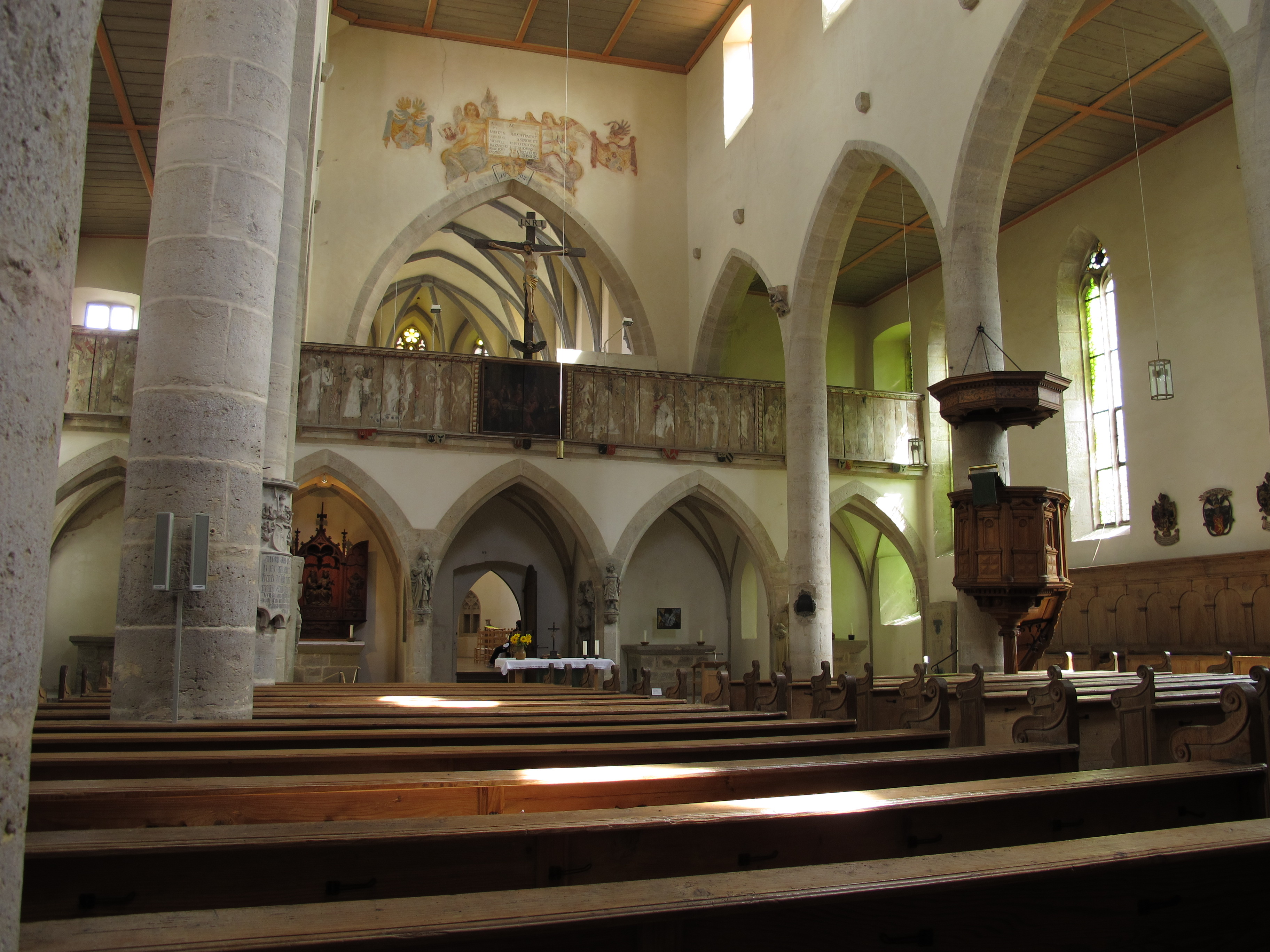 Franziskanerkirche in Rothenburg odT, Blick auf Lettner